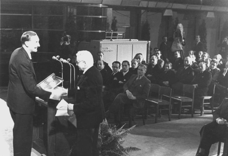 NWDR Der erste "unabhängige" deutsche Sender. Während einer Feierstunde im großen Sendesaal des Nordwestdeutschen Rundfunks in Hamburg am 30-12-47 fand die Übergabe der neuen Satzungen an den NWDR statt. Durch diese Satzungen wird der NWDR ab 1-1-48 eine Körperschaft des öffentlichen Rechts, die "unabhängig" vom Staat und von Parteien arbeiten wird. Unser Bild zeigt die feierliche Überreichung der neuen Satzungen durch den politischen Berater des britischen Mitlitärgouverneurs, Mr. Steel (links) an den Vorsitzenden des Hauptausschusses des NWDR., Präsident Dr. Kieselbach (rechts). 31-12-47 Illus-dpd